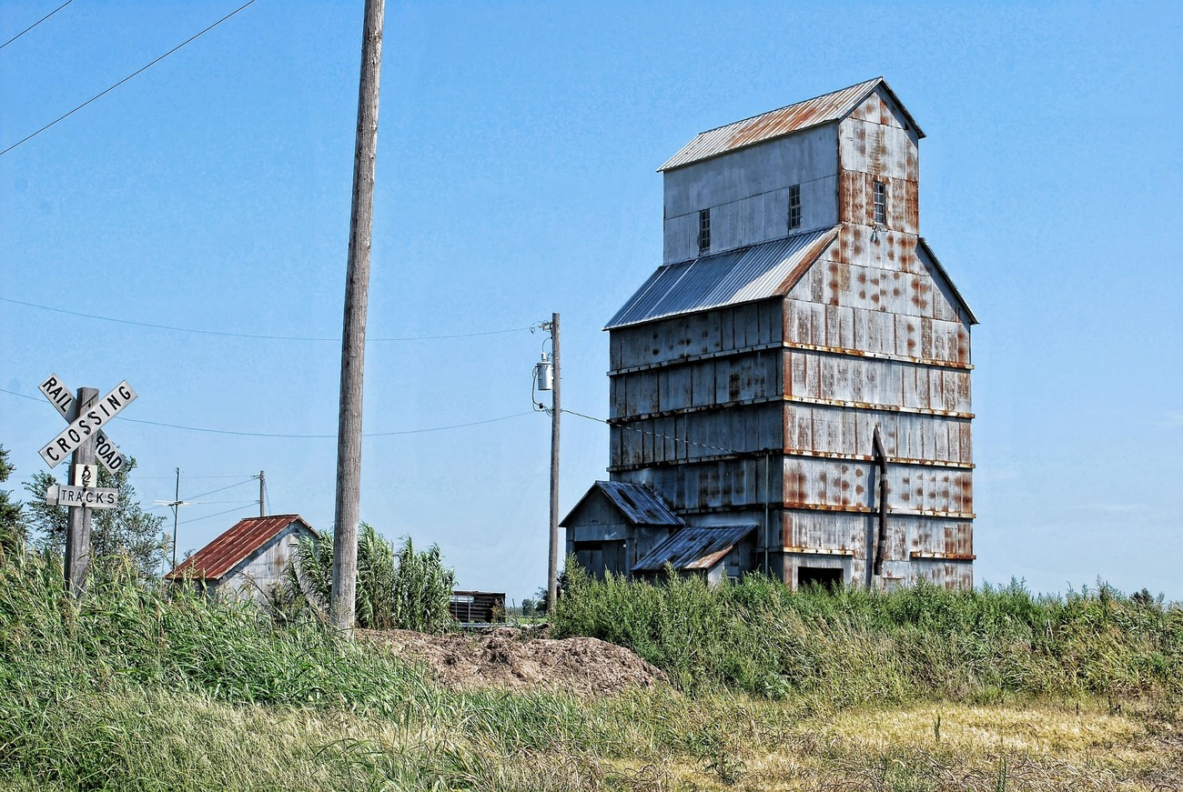 Dalton Kansas Elevator